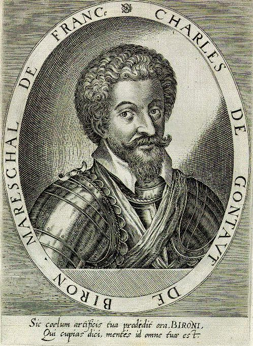 Charles de Gontaut, duc de Biron (* 1561; † 31. Juli 1602 in Paris) war ein französischer Heerführer und Diplomat, Marschall von Frankreich. Atrium heroicum Caesarum, regum, [...] imaginibus [...] illustr[atum].